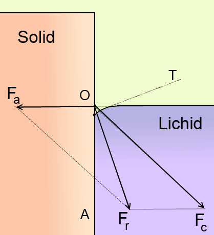 Adhesion